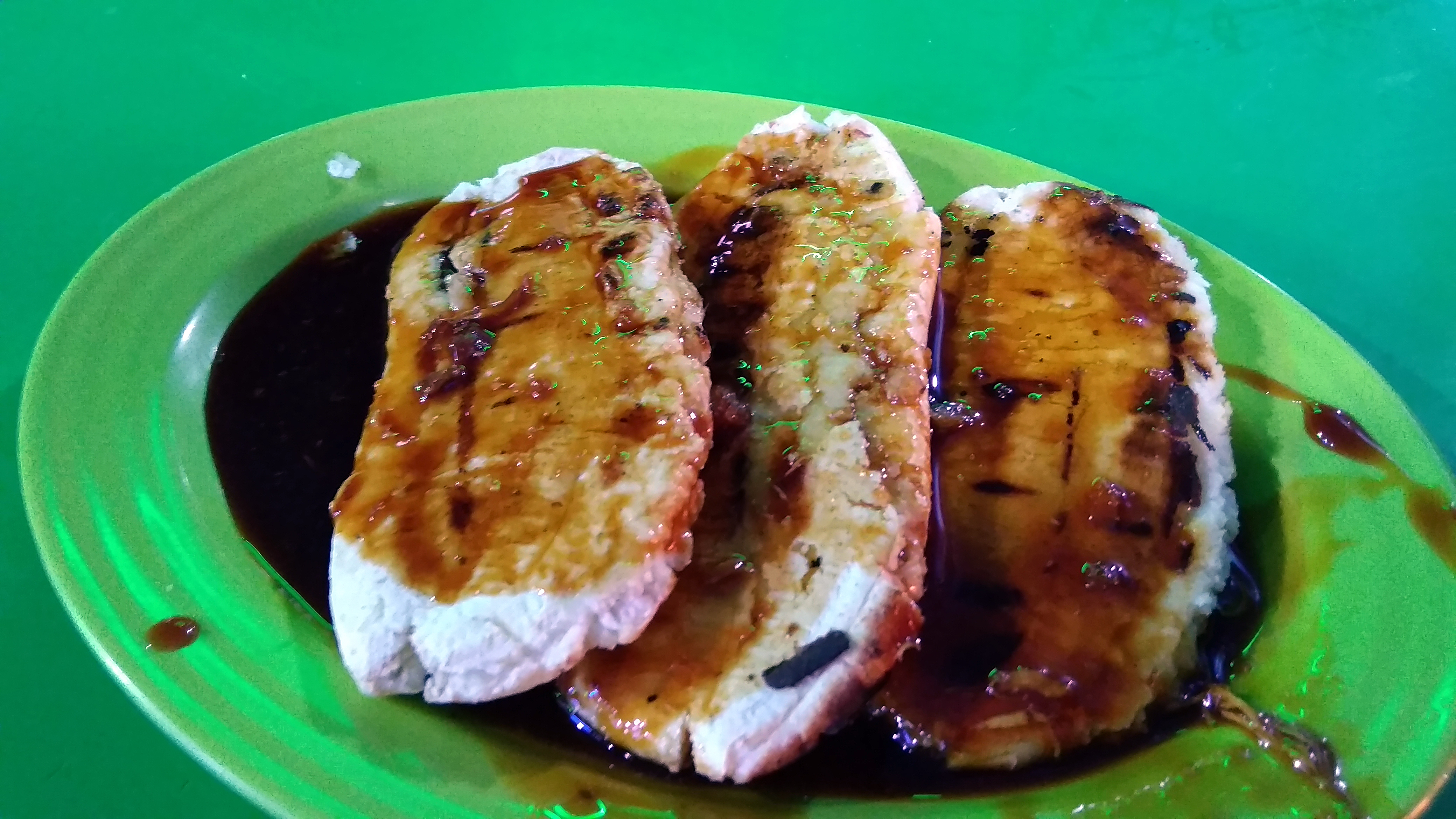 Pisang epe, makanan khas Makassar, Sulawesi Selatan. Epe berarti kepit, sesuai proses memasaknya yang terlebih dahulu dijepit sebelum dimasak.